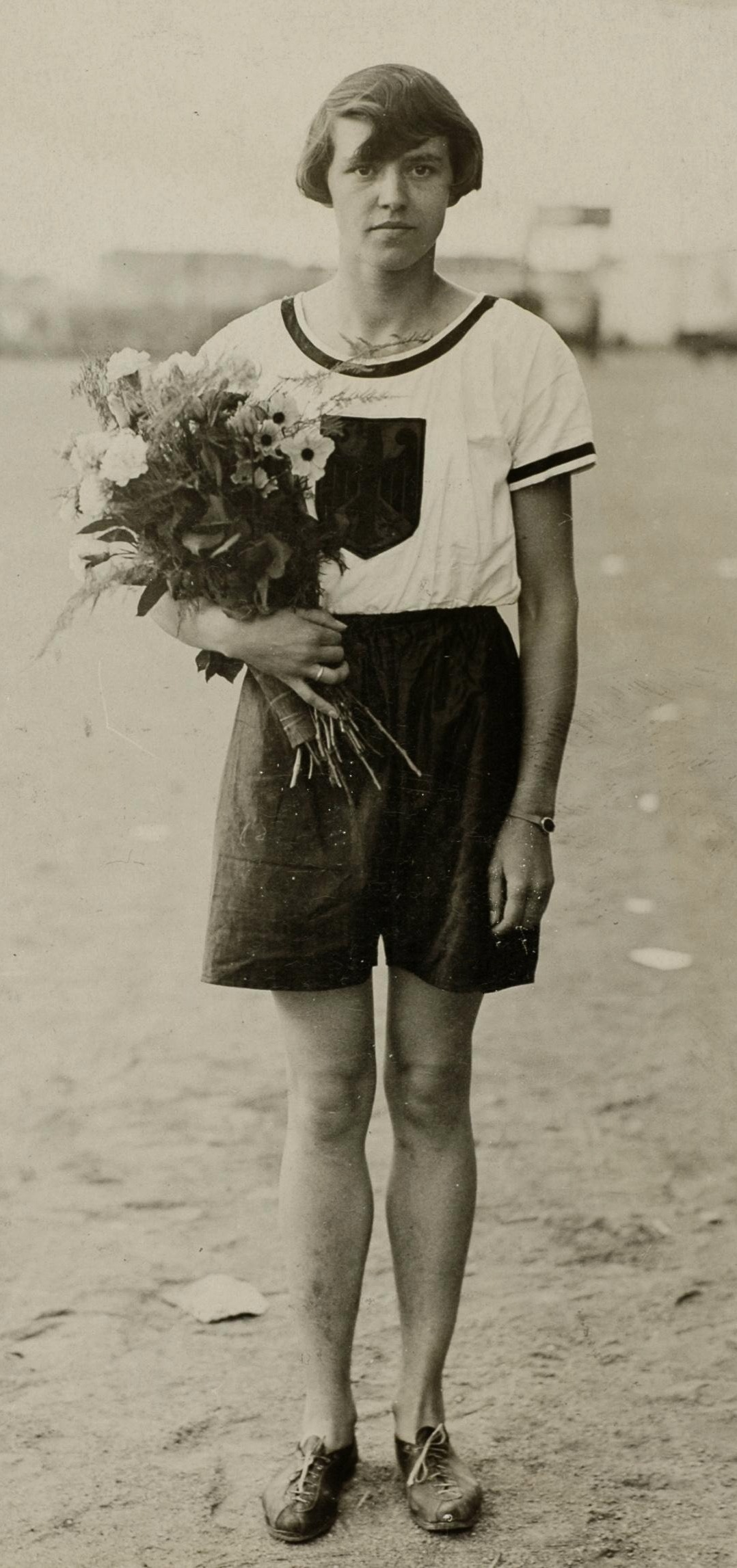 Sport. Sport, Olympische Spelen Amsterdam, 1928 : De Duitse athlete Lina Radke, olympisch kampioene op de 800 meter hardlopen (vrouwen).